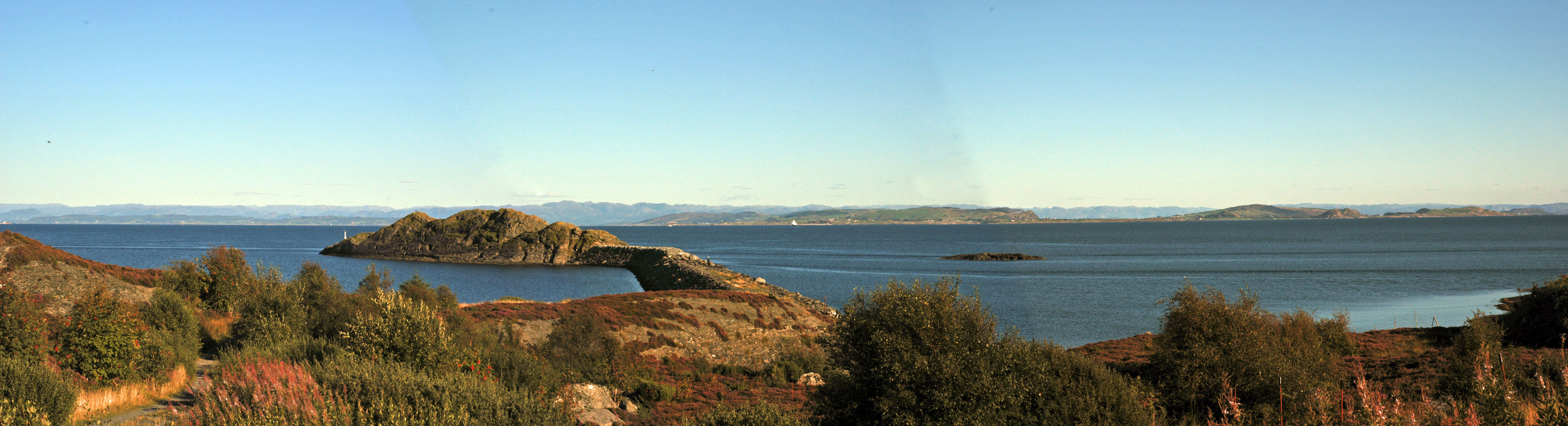 Bokn i Rogaland